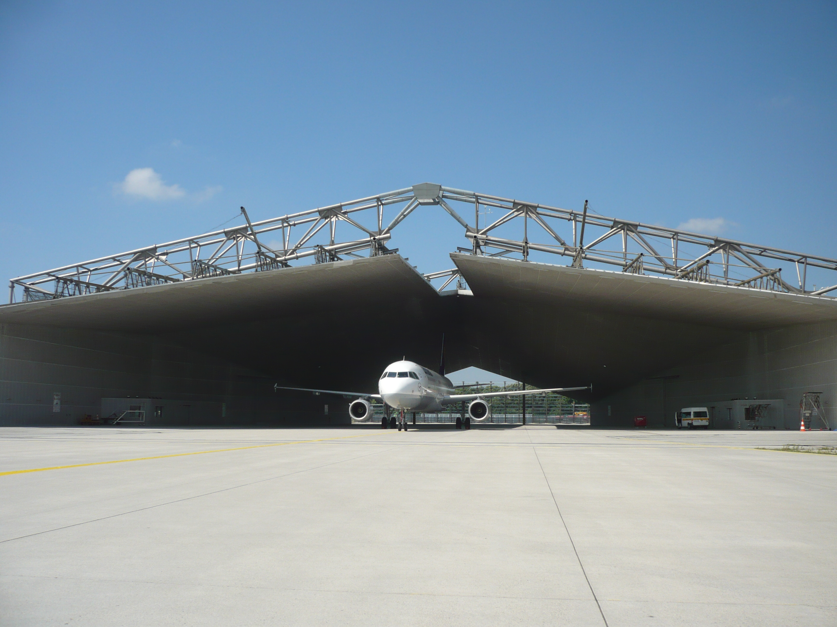 Triebwerkstesthalle am Flughafen München Franz Josef Strauß